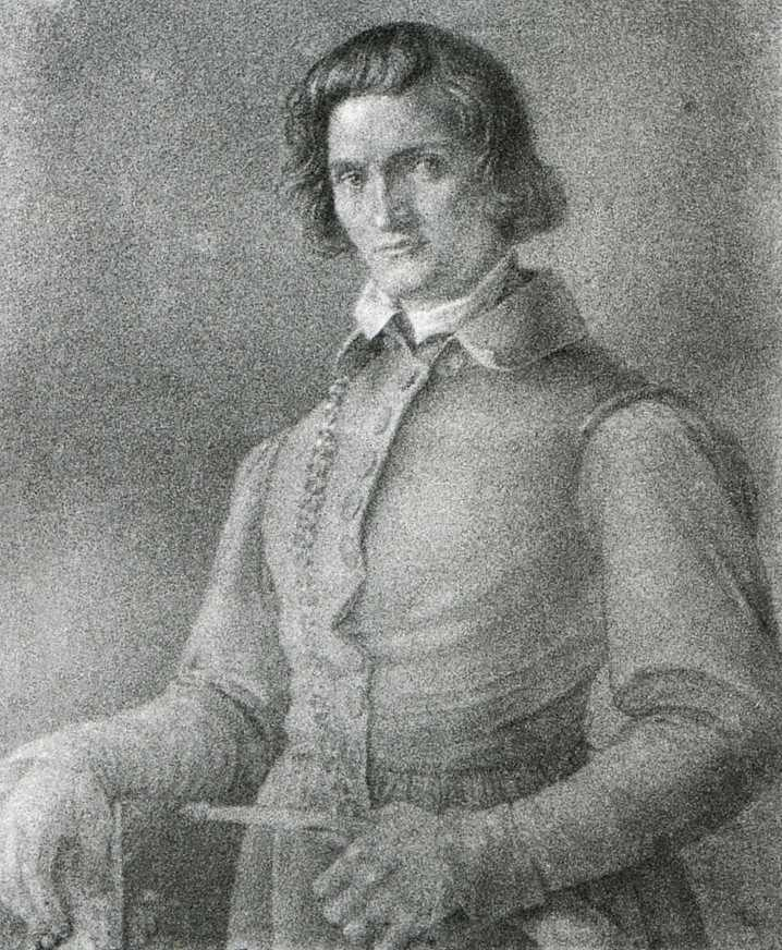 Porträt Hans Freiherr von und zu Aufseß von Louise Wolf (1830)